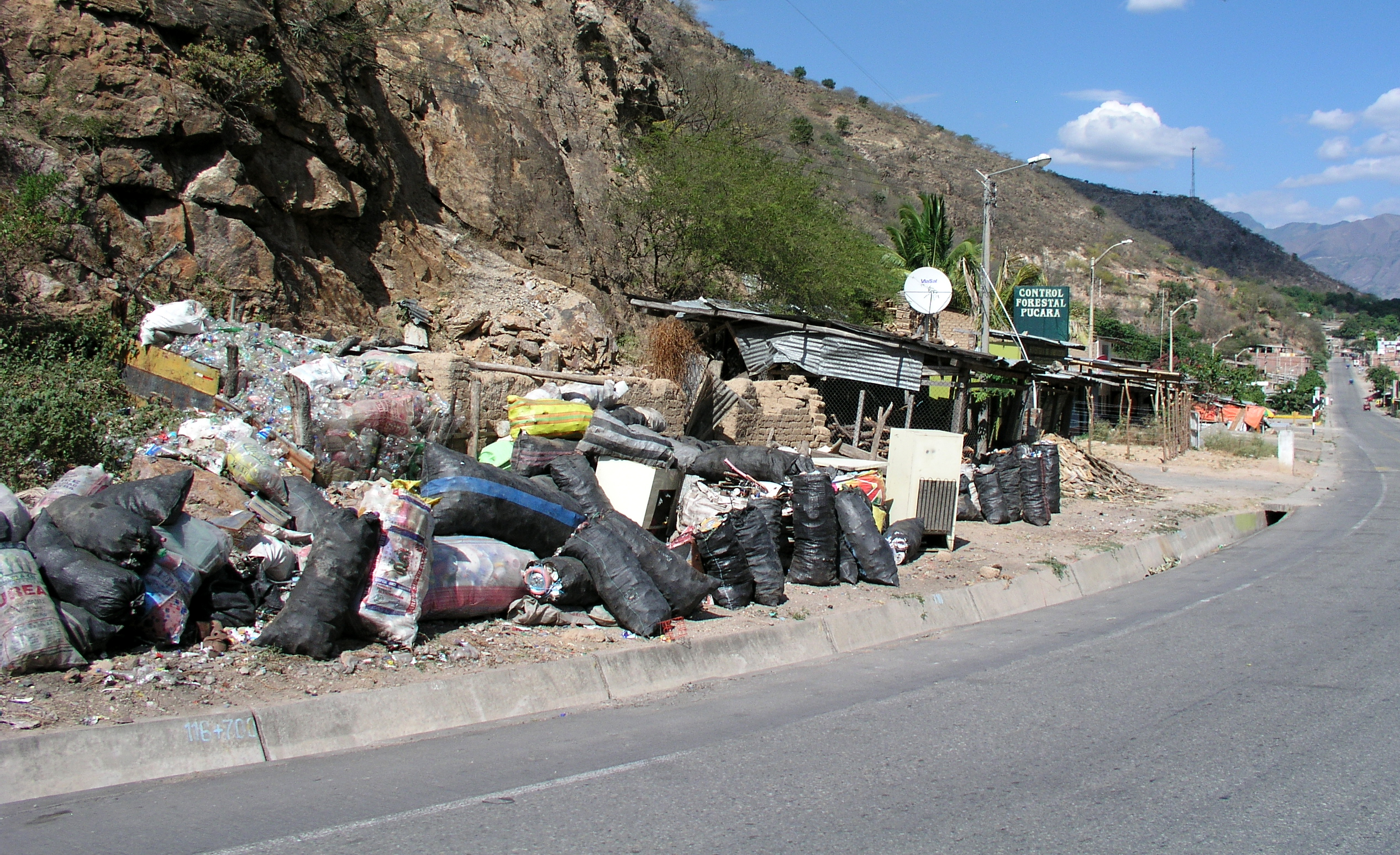 Basuras en Pucara, Cajamarca, Peru.